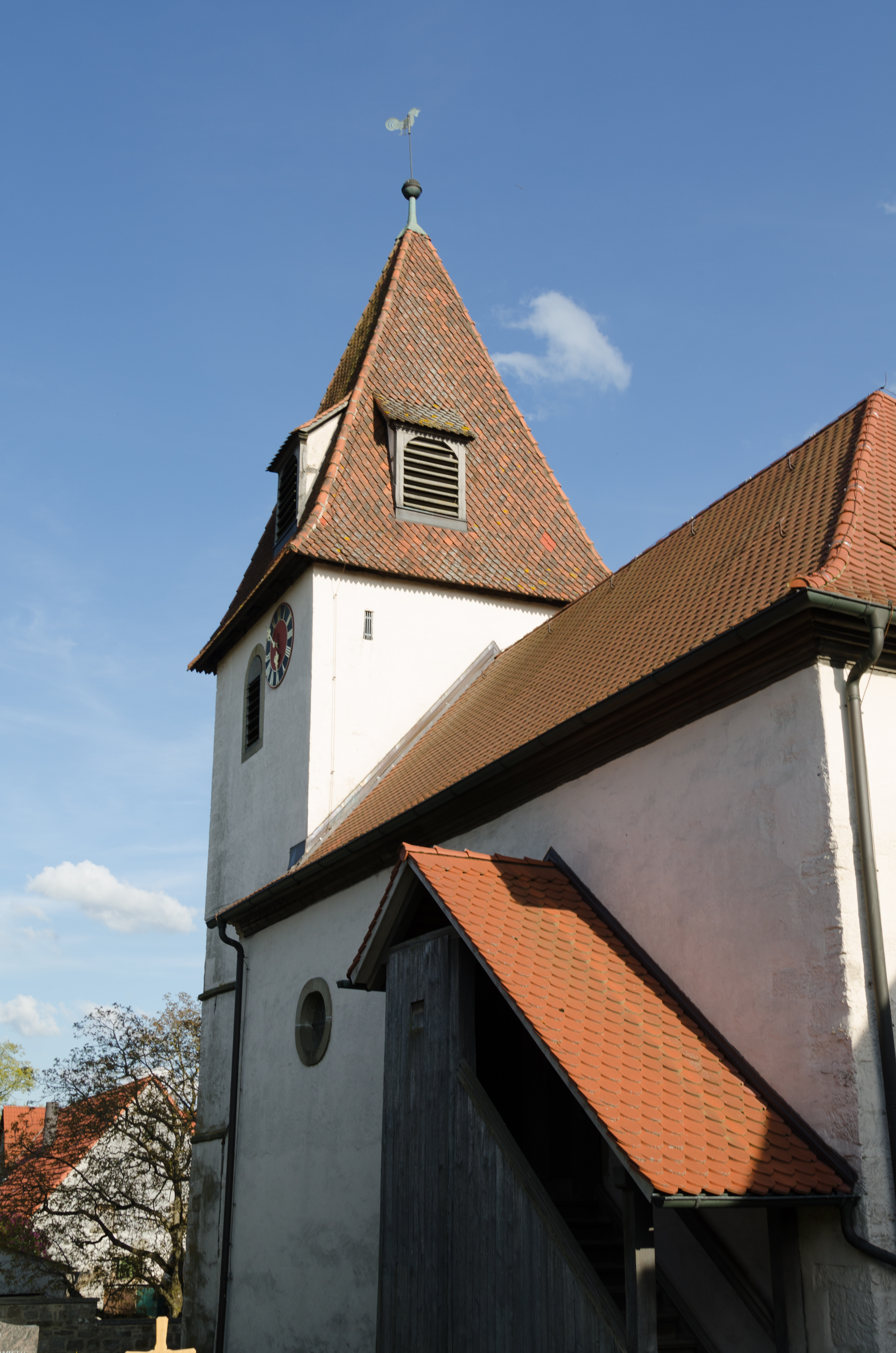 Evangelische Kirche St. Laurentius in Mörlbach